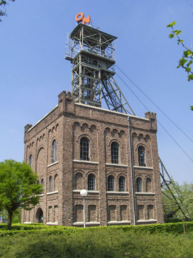 Nationaal-Mijncentrum-Heerlen